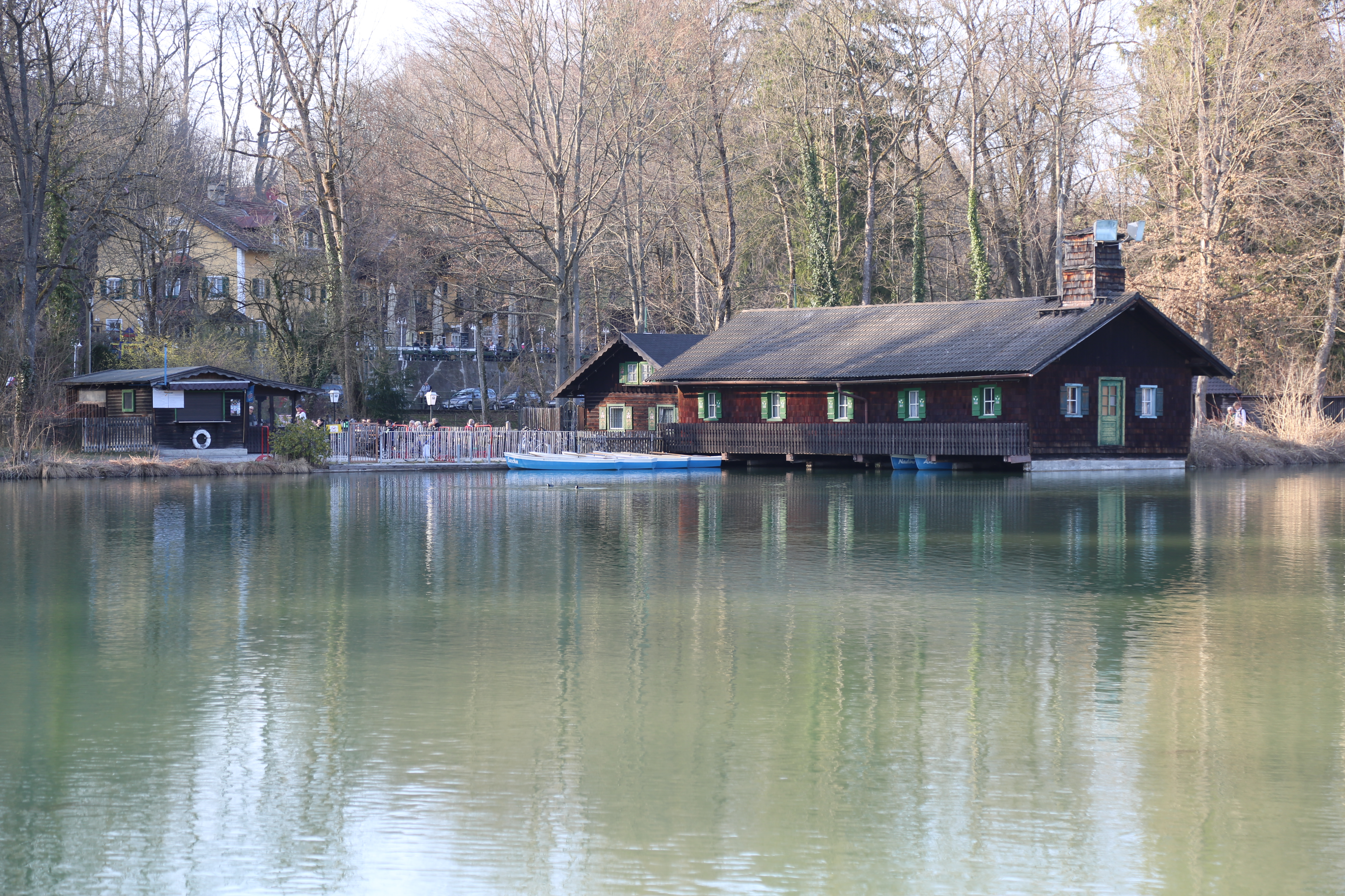 Hinterbrühl, im Münchner Stadtteil Thalkirchen